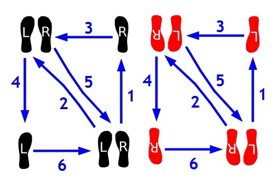 Grundschritt des Langsmen Walzers. Links die Herren-, rechts die Damenschritte